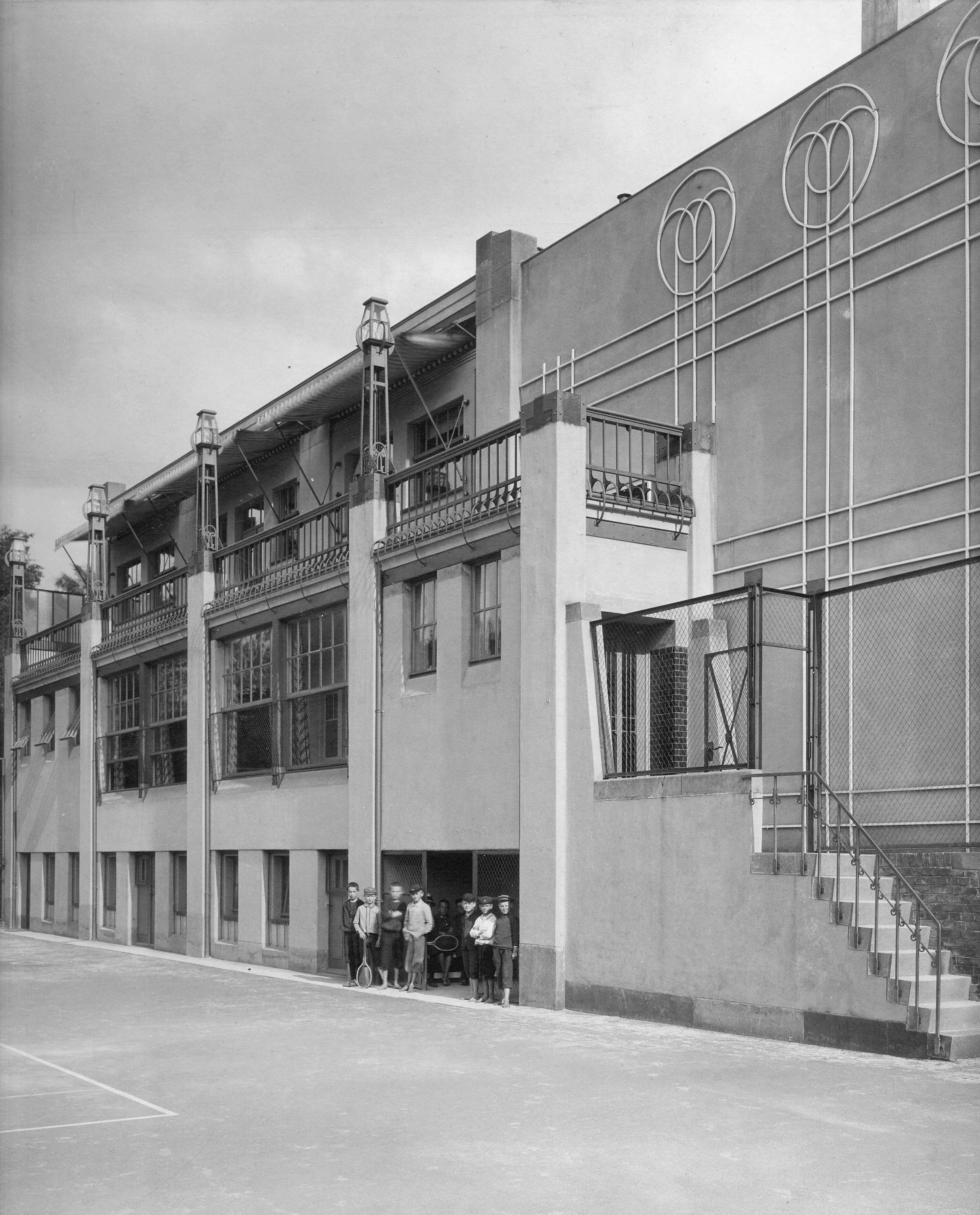 Clubhaus des Chemnitzer Lawn-Tennis-Club. Position: 50.823056°, 12.90775°